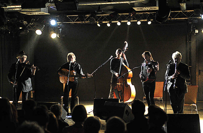 Bratsch Konzert